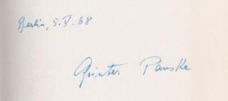 Günter Panske Autograph 1968